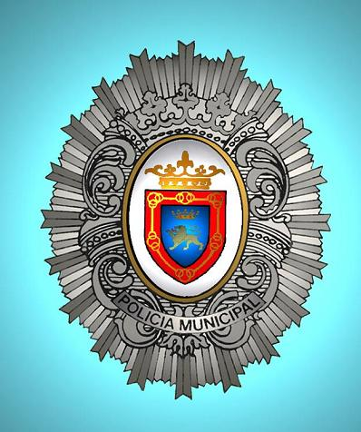 Escudo Policía Municipal de Pamplona